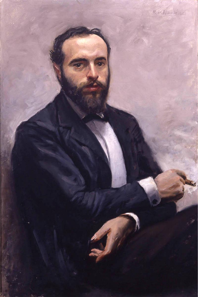 Retrato del escritor y diplomático español Ángel Ganivet (1865-1898).